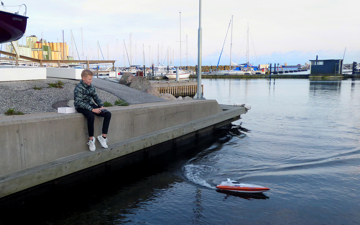 En pojke kör sin radiostyrda båt i Ystads småbåtshamn 14 sep 2019.